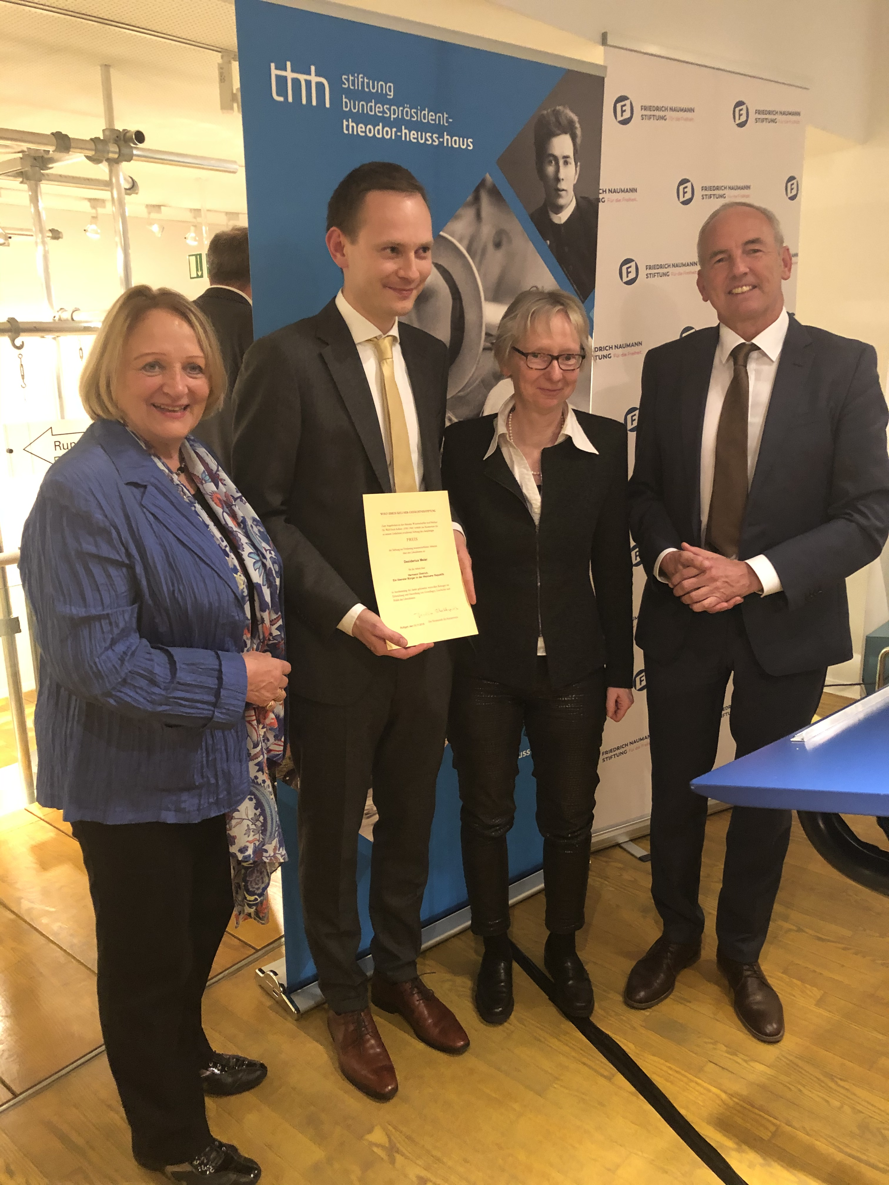 WEK-Preisverleihung an Desiderius Meier (2. v.l.), links Sabine Leutheusser-Schnarrenberger, rechts Joachim Scholtyseck und Anne Chr. Nagel